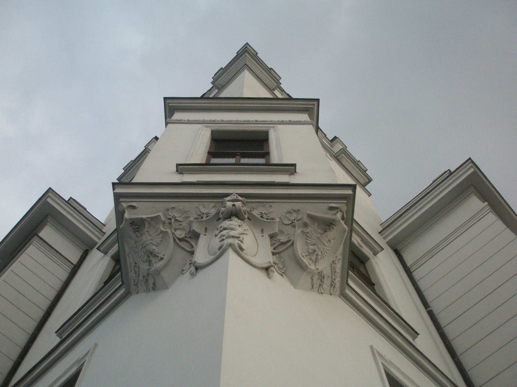 Radnice Slezske Ostravy